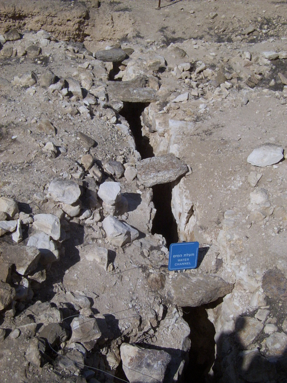 Canalisation, site archéologique d'Arad, Israël.